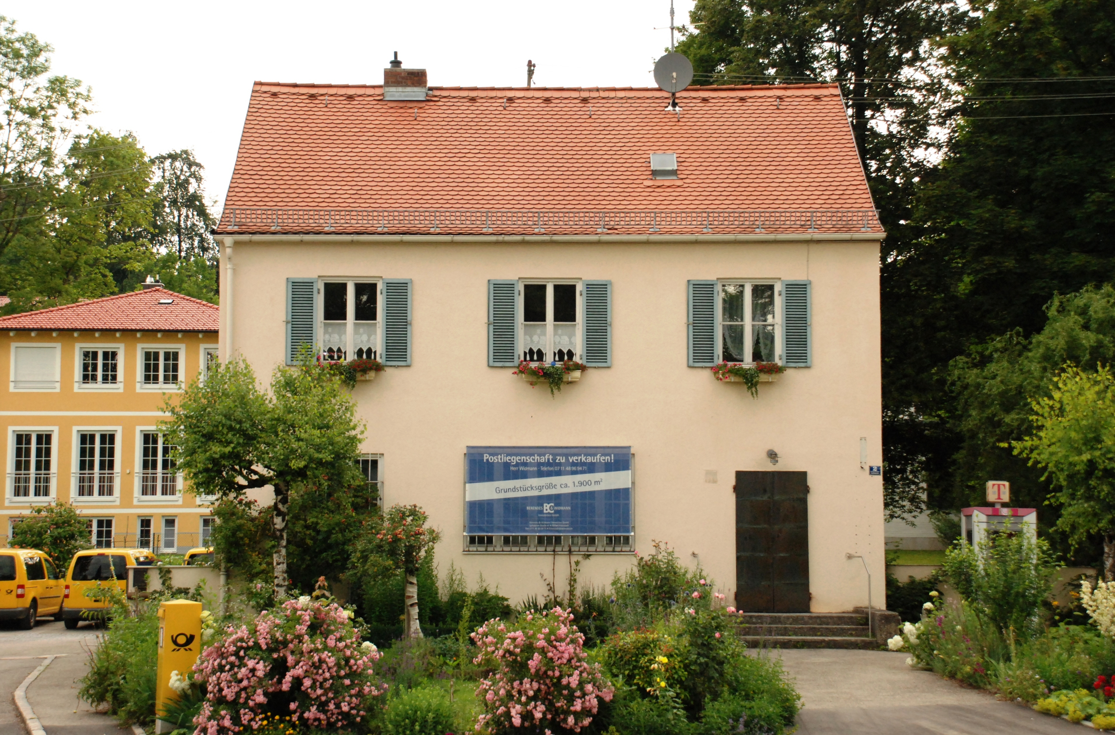 Ehemaliges Postamt in Ebenhausen, Gemeinde Schäftlarn, Landkreis München, Regierungsbezirk Oberbayern, Bayern. Erbaut im Jahr 1934 nach Plänen von Franz Holzhammer und Hans Schnetzer. Foto gemäß den Voraussetzungen zur Panoramafreiheit von öffentlicher Verkehrsfläche aus aufgenommen.